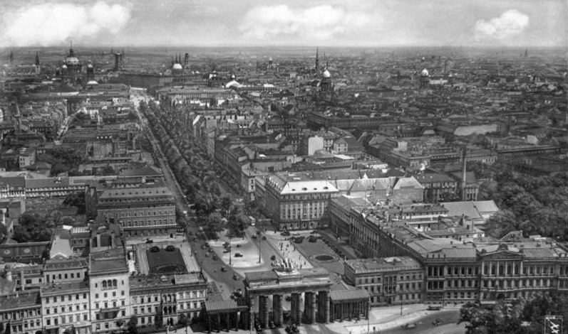 Berlin; Brandenburger Tor und Unter den Linden [Luftaufnahme] Okt. 1931 Information added by Wikimedia users.